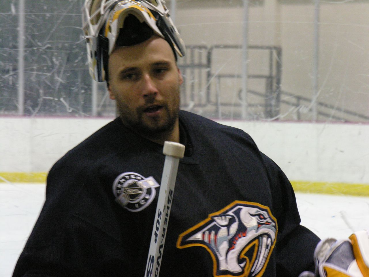 Tomáš Vokoun, ice hockey goaltender.